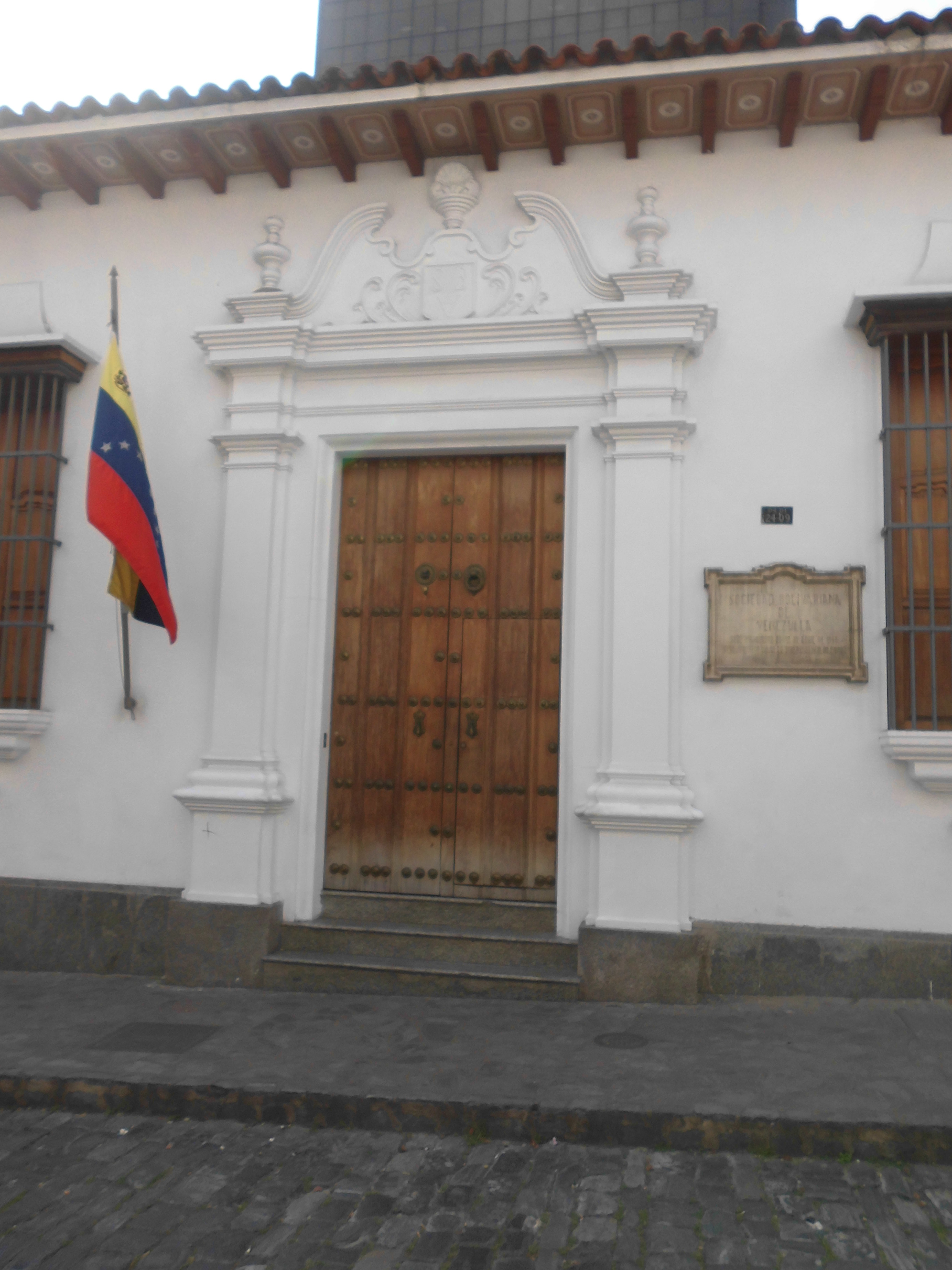 Puerta Principal de la Sociedad Bolivariana